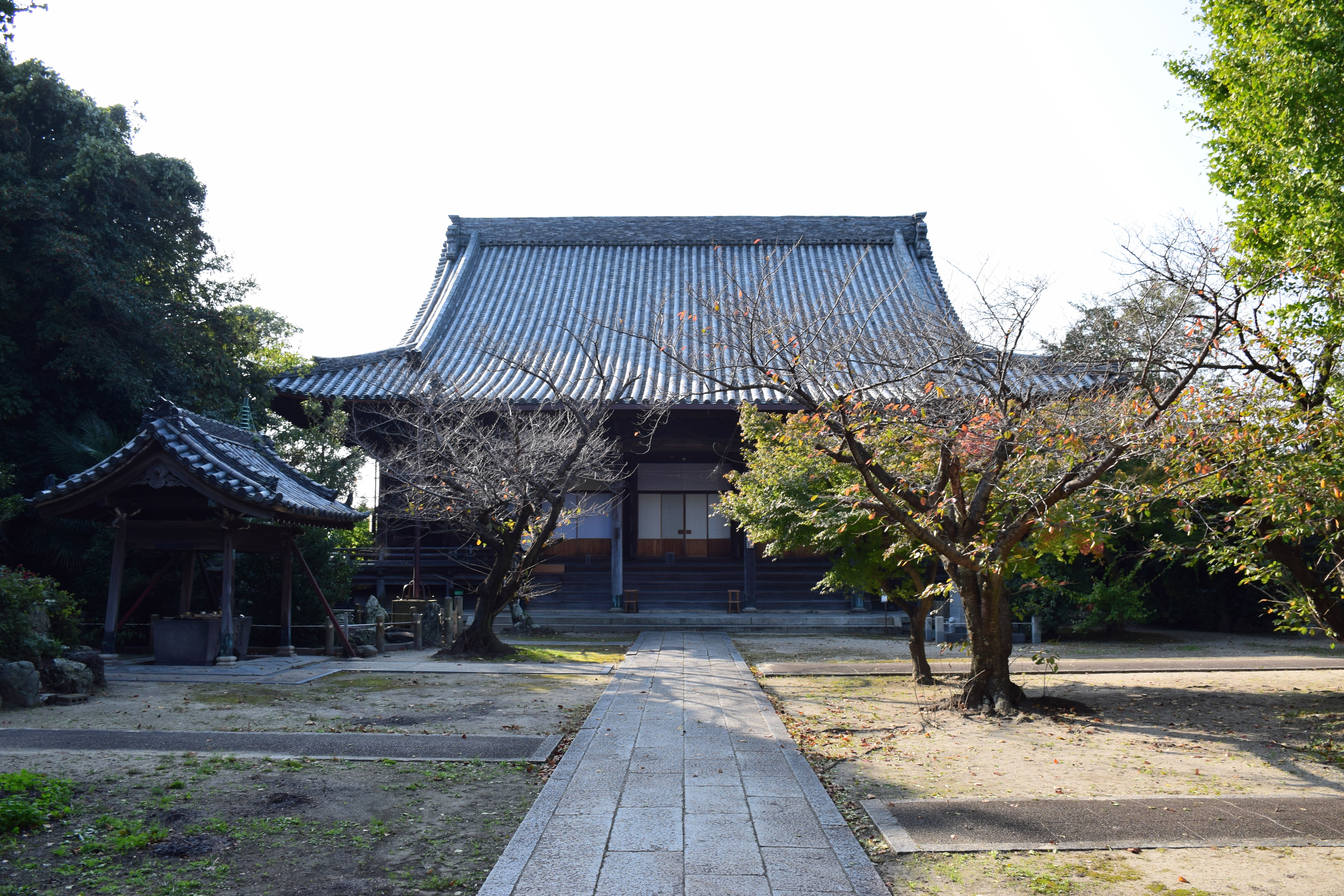 正住院本堂